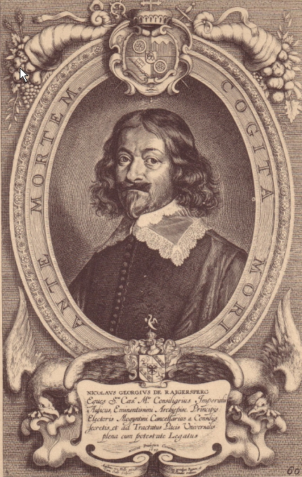 Nikolaus Georg von Reigersberg (~1652-?)